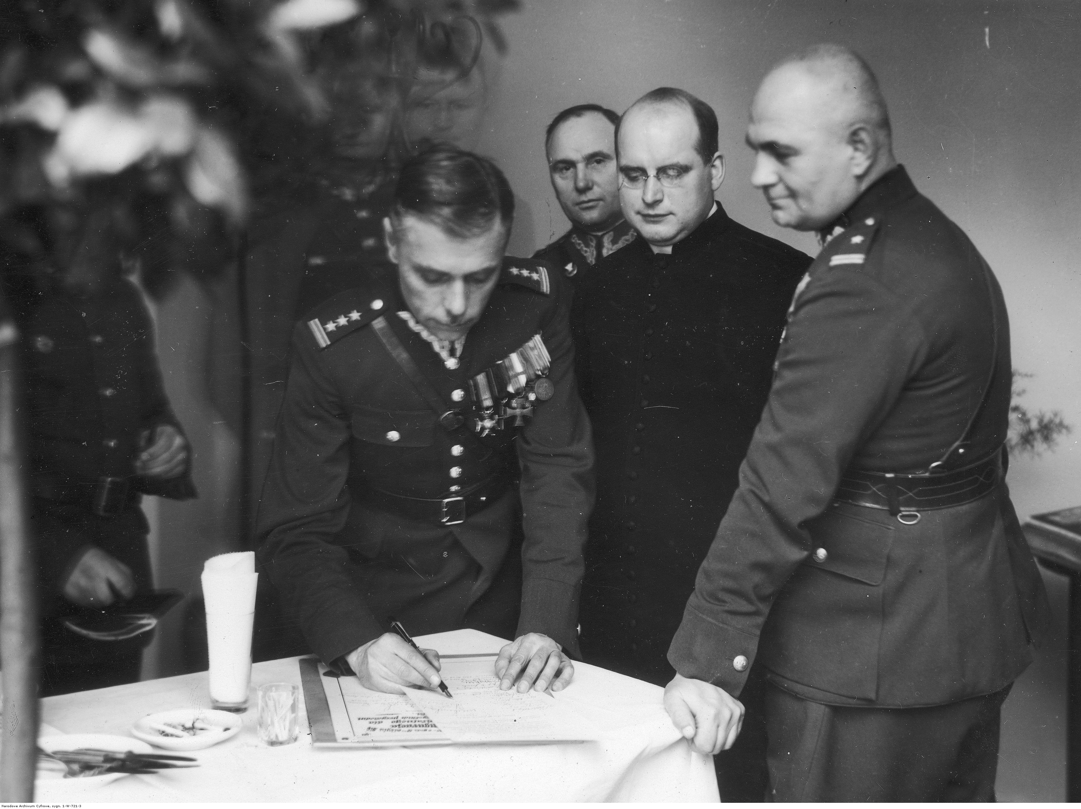 Poświęcenie nowego pawilonu VII Okręgowego Szpitala Wojskowego w Poznaniu. Płk dr Teofil Kucharski wpisuje się do księgi pamiątkowej nowego szpitala. Widoczni także m.in.: ks. kapelan Franciszek Dymarski (2. z prawej) i mjr dr Longin Wałęga (1. z prawej) z korpusu sądowego. Koncern Ilustrowany Kurier Codzienny - Archiwum Ilustracji. Sygnatura: 1-W-721-3